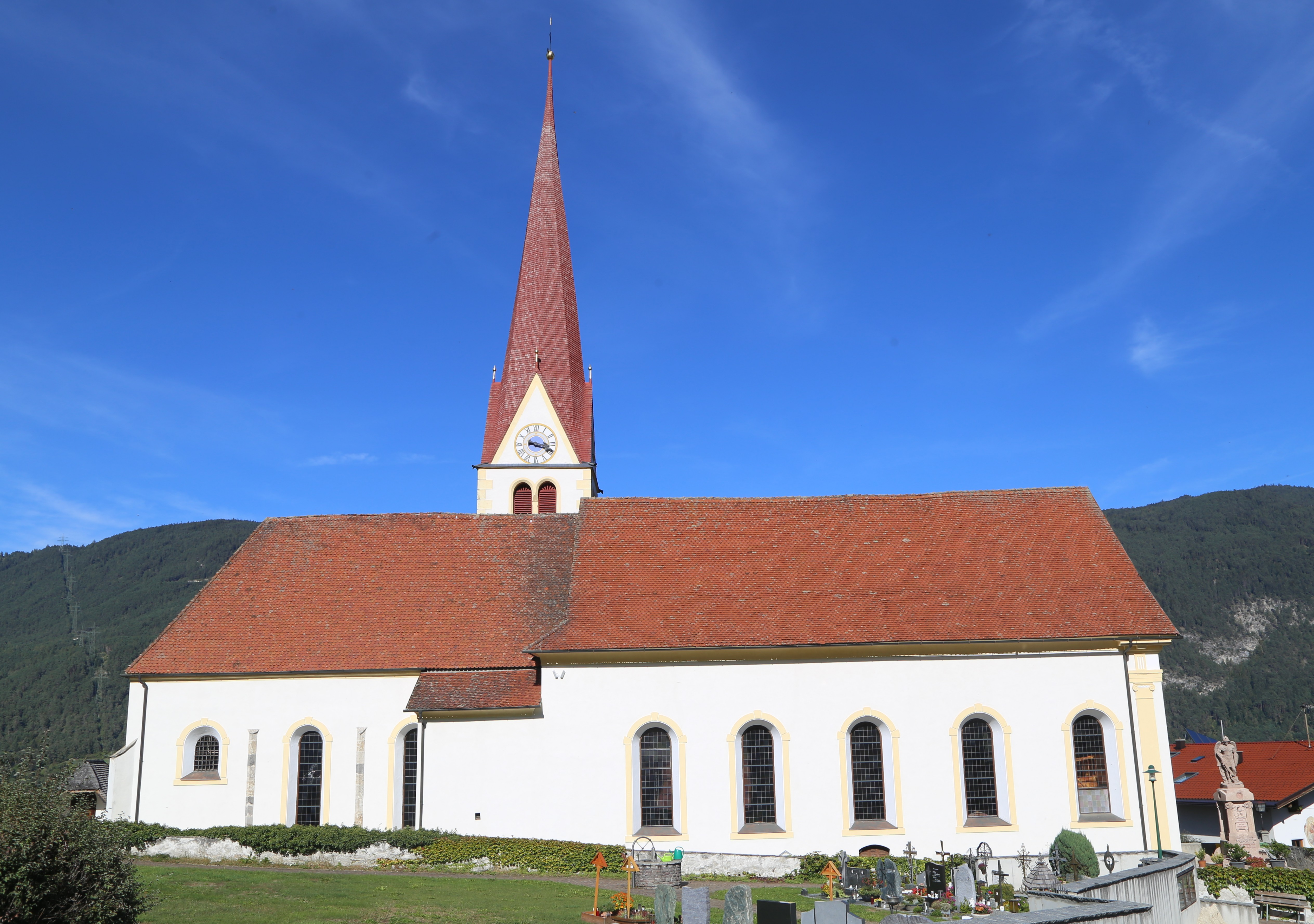 Kath. Pfarrkirche hl. Margareta, Kirchplatz, Flaurling; Urkundlich wurde 1326 die Weihe einer Kapelle genannt. 1508 erfolgte eine Vergrößerung mit dem Baumeister Oswald Klotz. 1578 erfolgte eine Einwölbung und Verzierung mit gotischen Rippen mit Wolfgang Rosenberger der Jüngere. 1750 war ein Umbau. 1836 erfolgte ein Neubau des Langhauses und damit eine neue Ausrichtung der Kirche mit dem Architekten und Bildhauer Josef Falbesoner. Hochaltarblatt hl. Margarethe, gemalt von Caspar Jele (1843) Object location47° 17′ 27.48″ N, 11° 07′ 17.68″ E